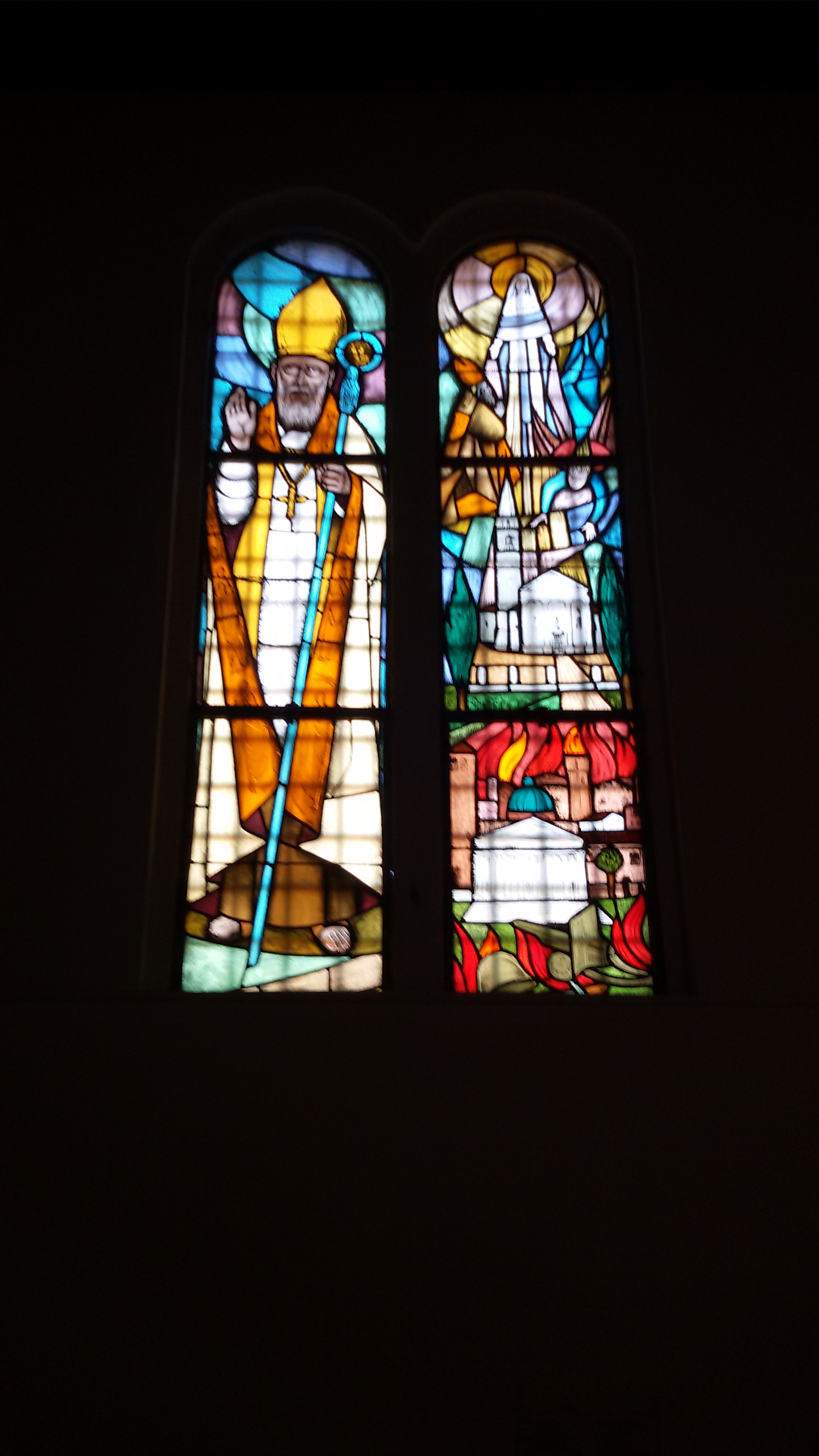 Chiesa di Santa Cristina Quinto di Treviso